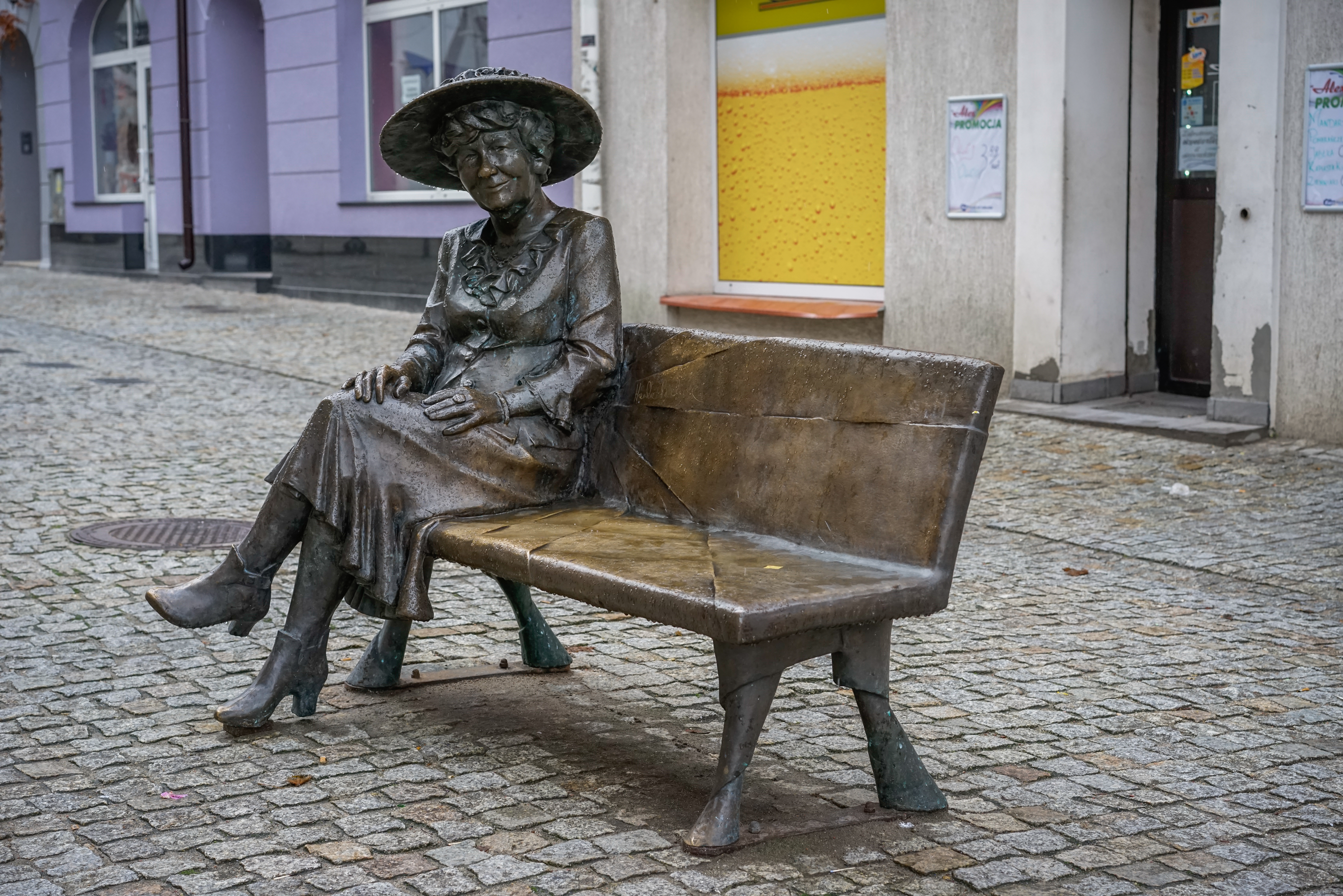 Pomnik-ławka Hanki Bielickiej w Łomży, ulica Farna